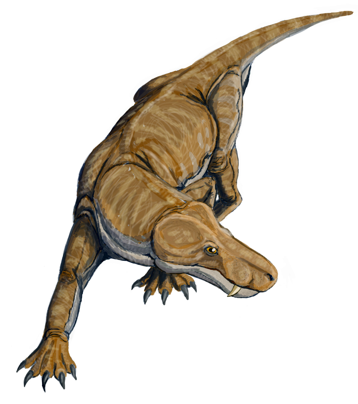 Sauroctonus